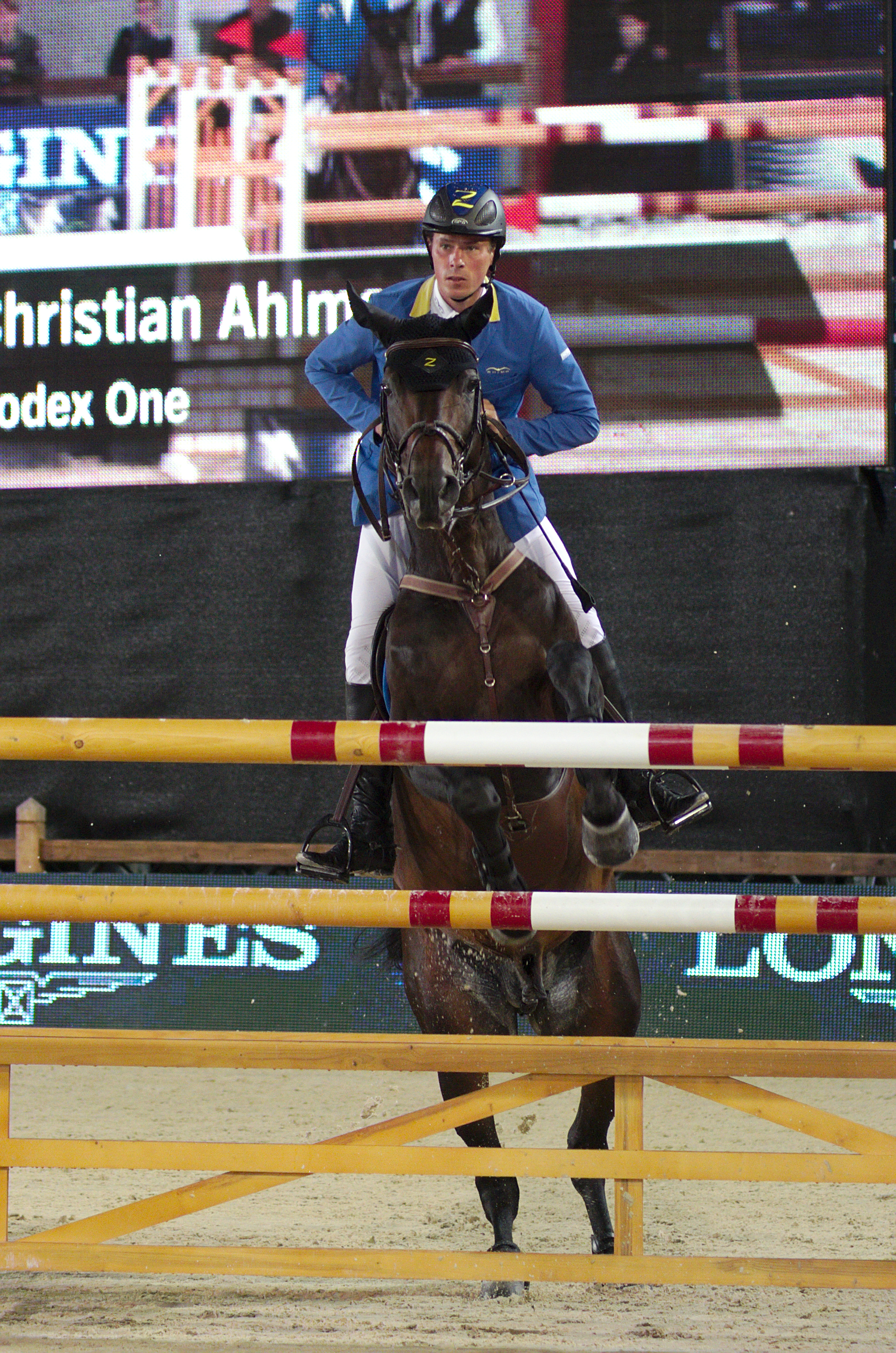 2013 Longines Global Champions - Lausanne - 14-09-2013 - Christian Ahlmann et Codex One